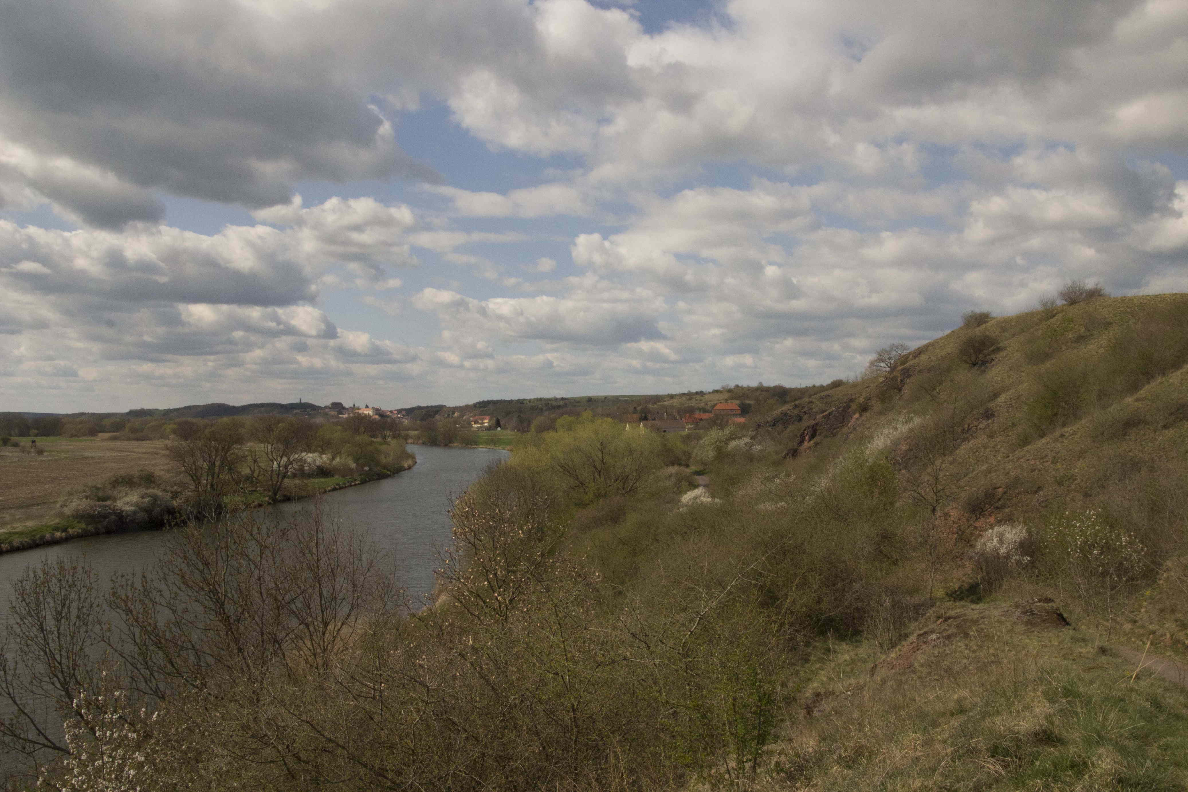 Naturschutzgebiet „Porphyrlandschaft bei Gimritz“: Rhyolithfelsen an der Saale